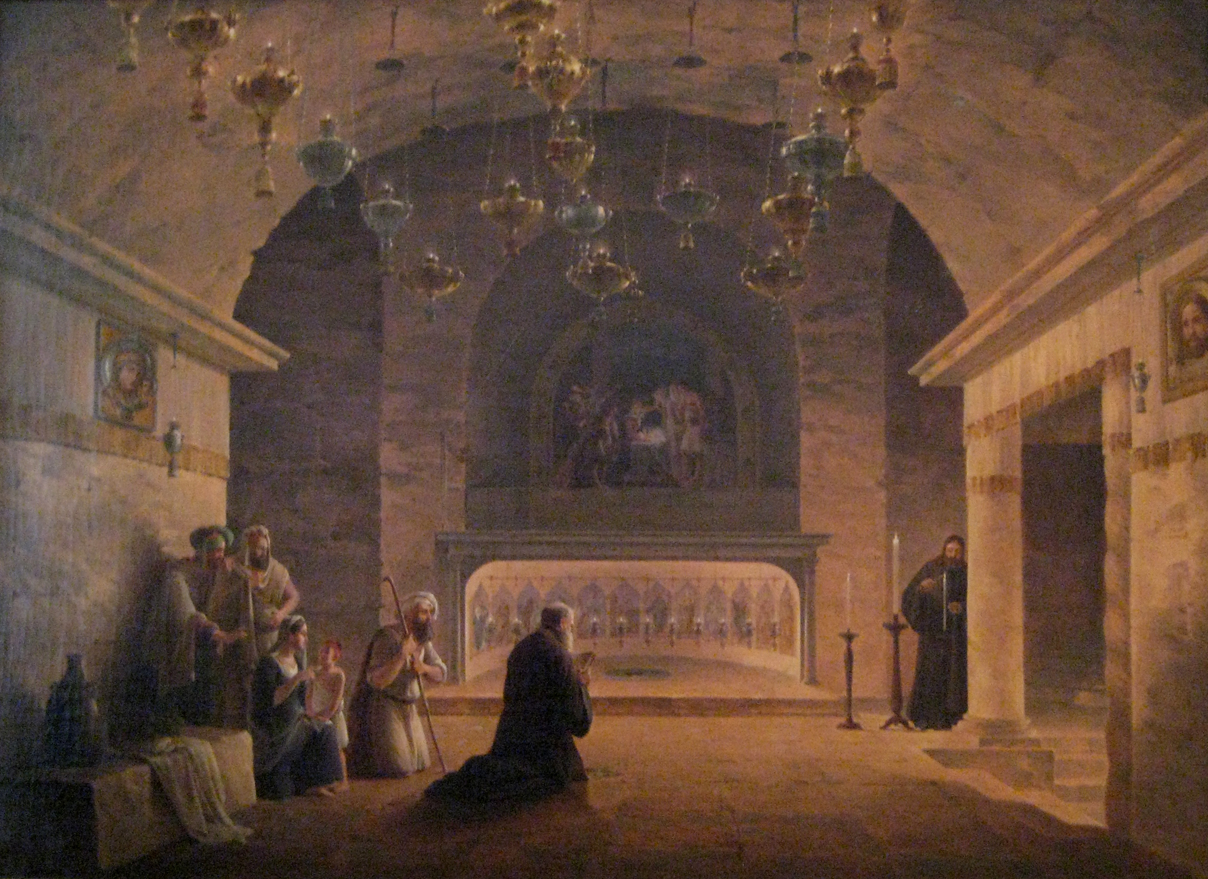 М. Н. Воробьев. «Пещера Рождества Христова в Вифлееме». 1833 г. Холст, масло. 112×152. Псковский государственный объединённый историко-архитектурный и художественный музей-заповедник.